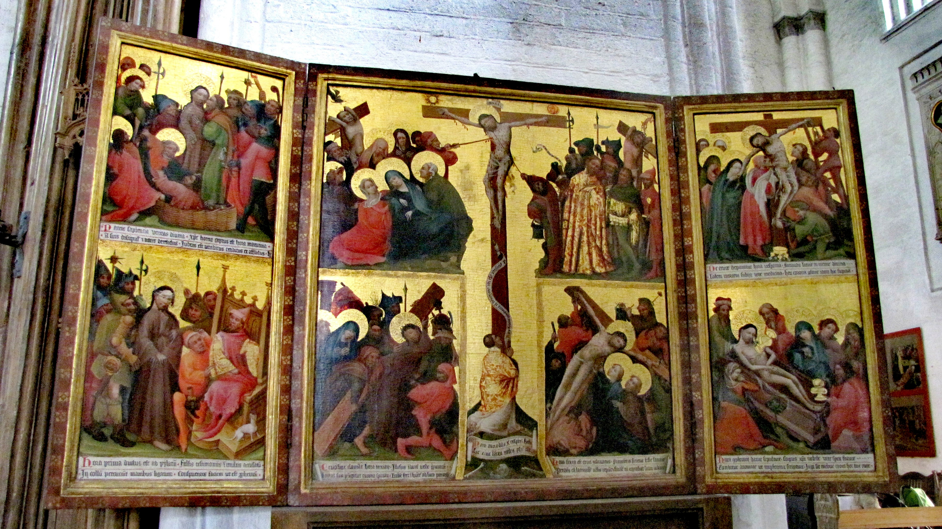 Altar der kanonischen Tageszeiten, Lübeck cathedral